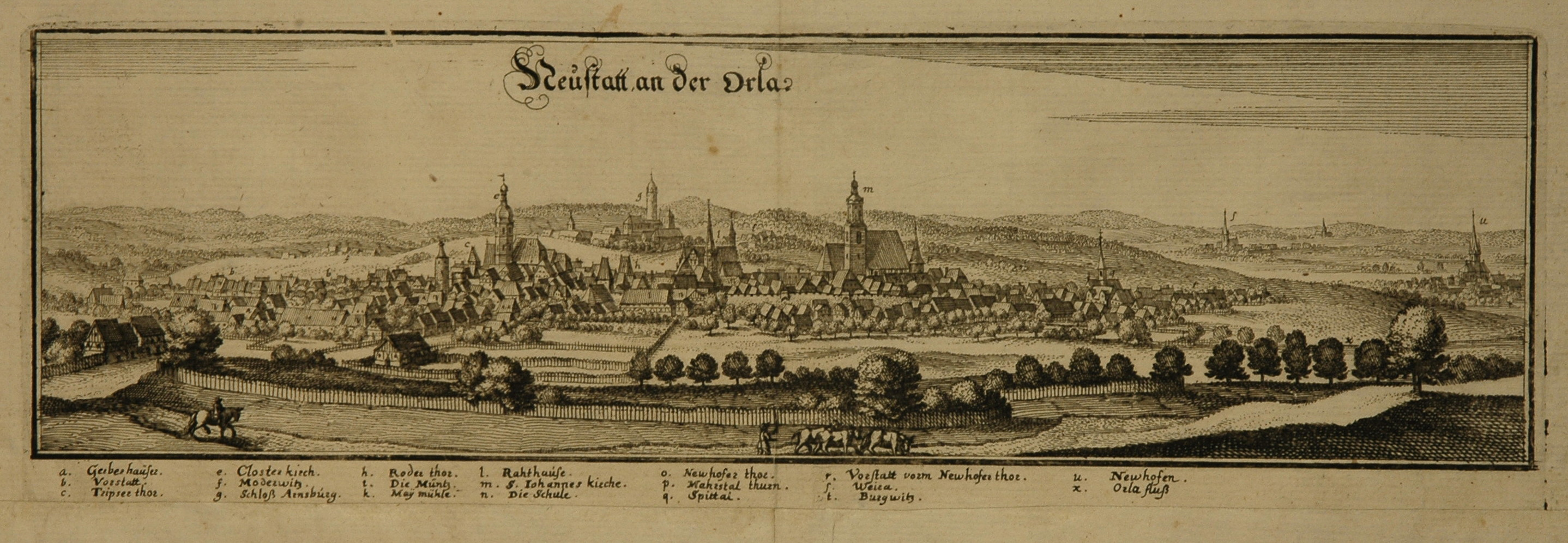 Kupferstich 10,5 x 32cm von Merian (1650)